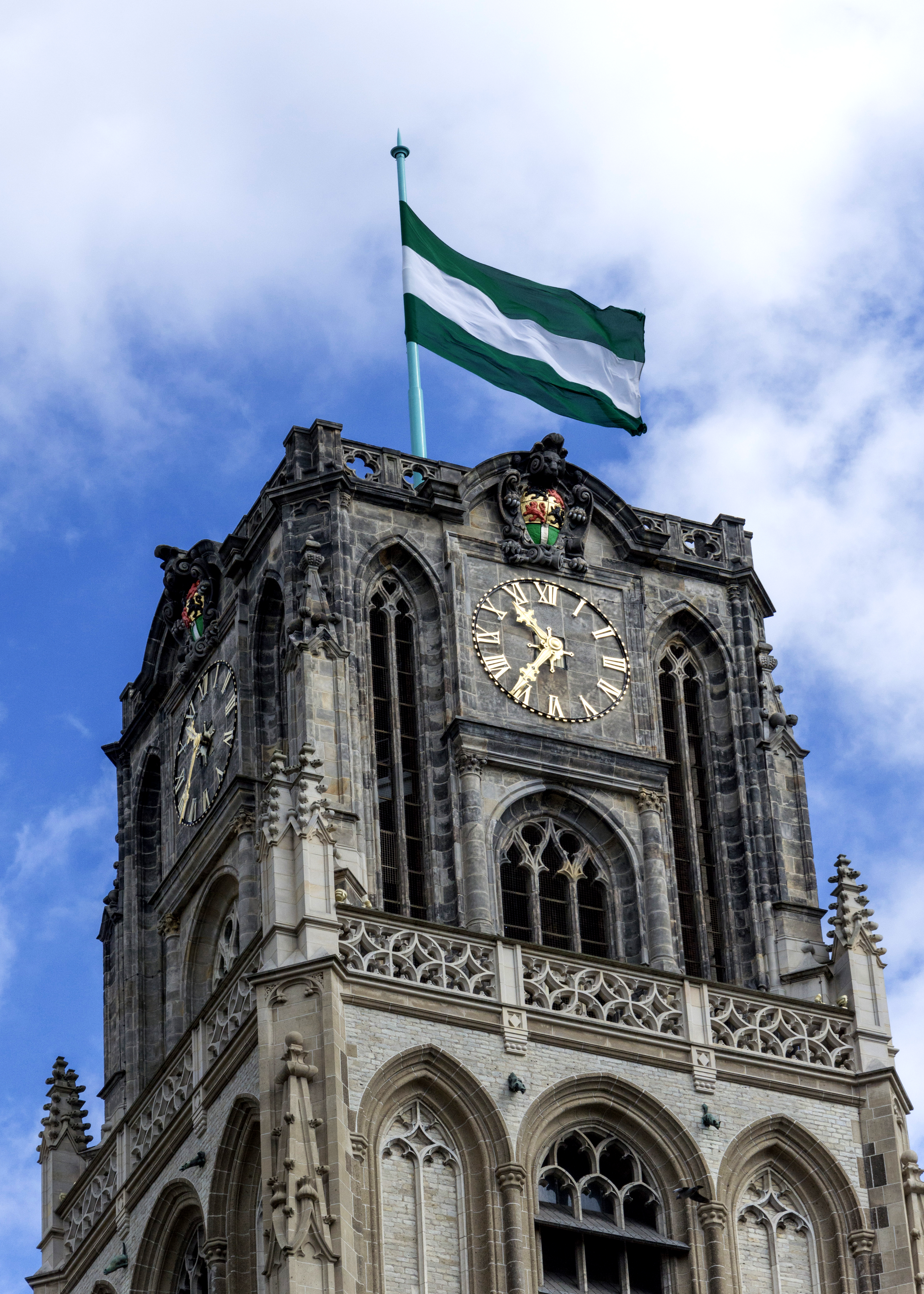 Laurenskerk, Rotterdam